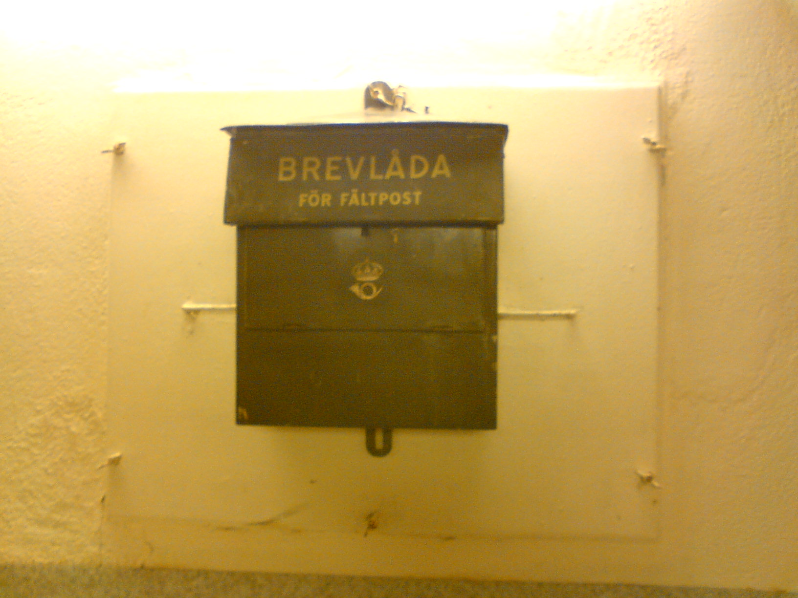 Fältpostbrevlåda i Hemsö fästning. Eng: Military mail box inside Fort Hemsö.